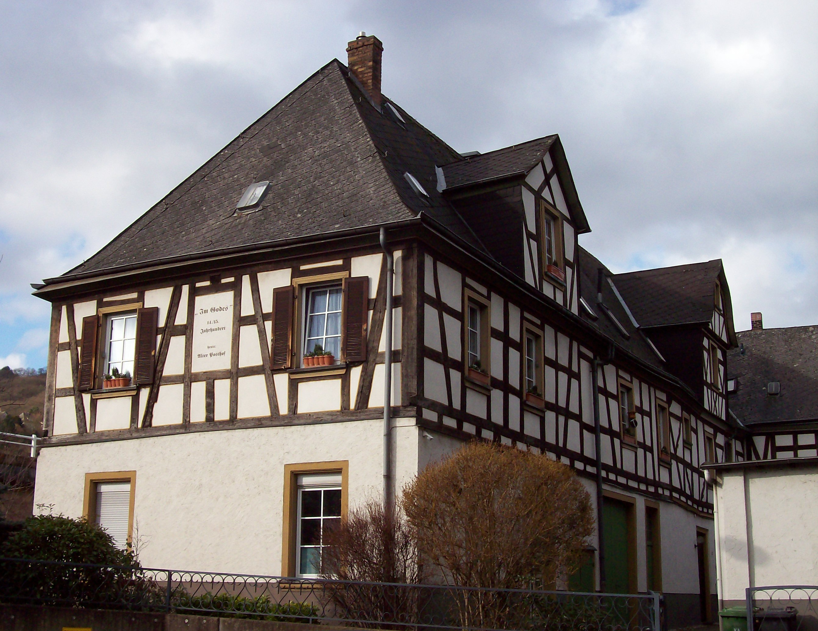 Ehemaliges Kleines Hospital in Boppard; Adresse: Am Alten Posthof 2 Es befindet sich mittlerweile in Privatbesitz.